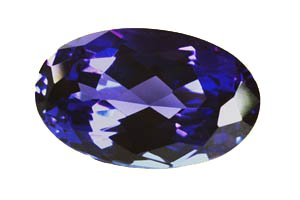 Tansanit geschliffen